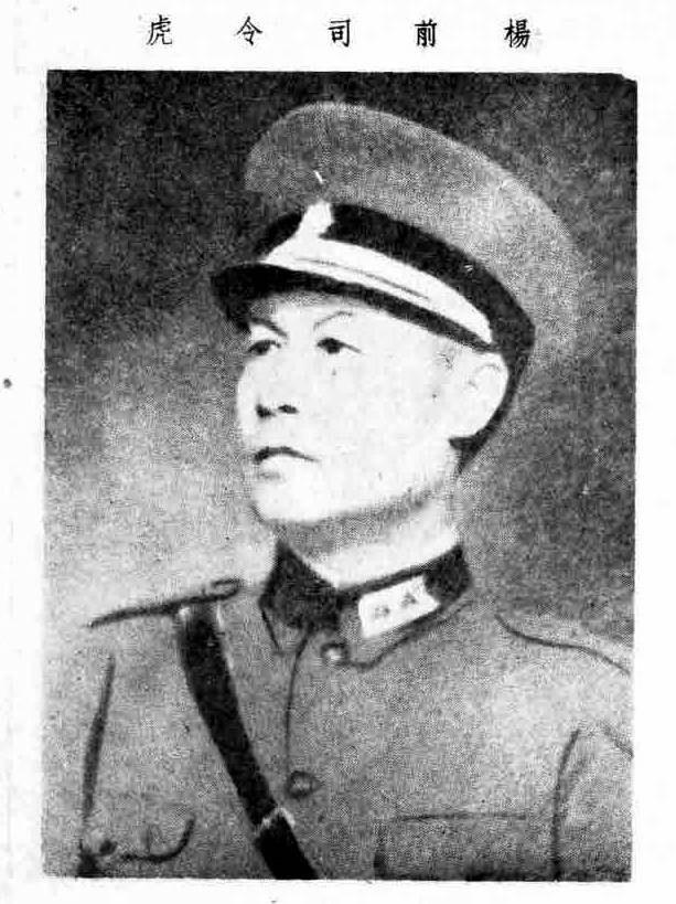 中文（台灣）: 上海市公訓同學紀念